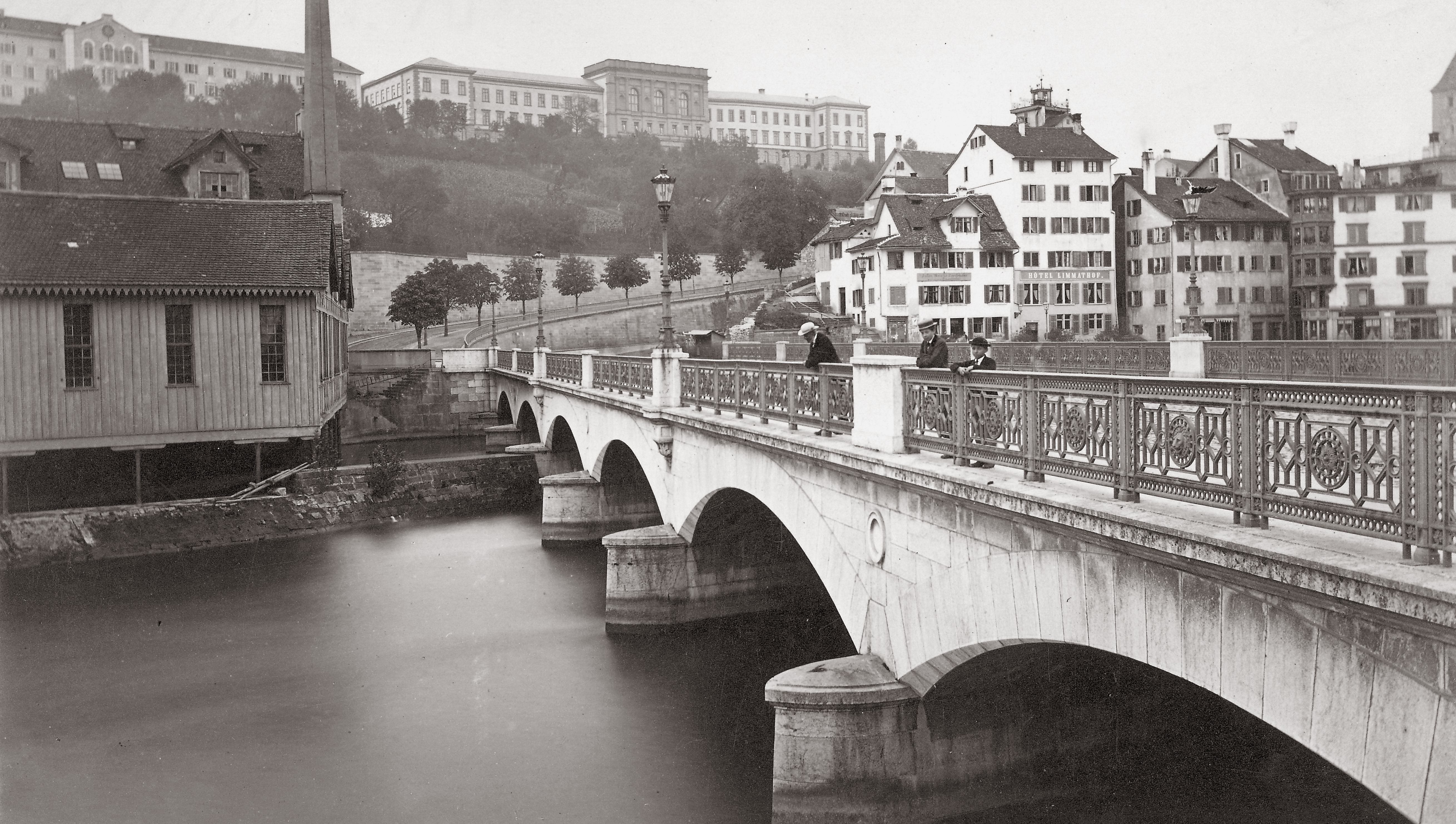 Bahnhofbrücke über die Limmat, erbaut 1861 bis 1863 unter der Leitung von Arnold Bürkli. Links das erste Fabrikgebäude der Escher Wyss